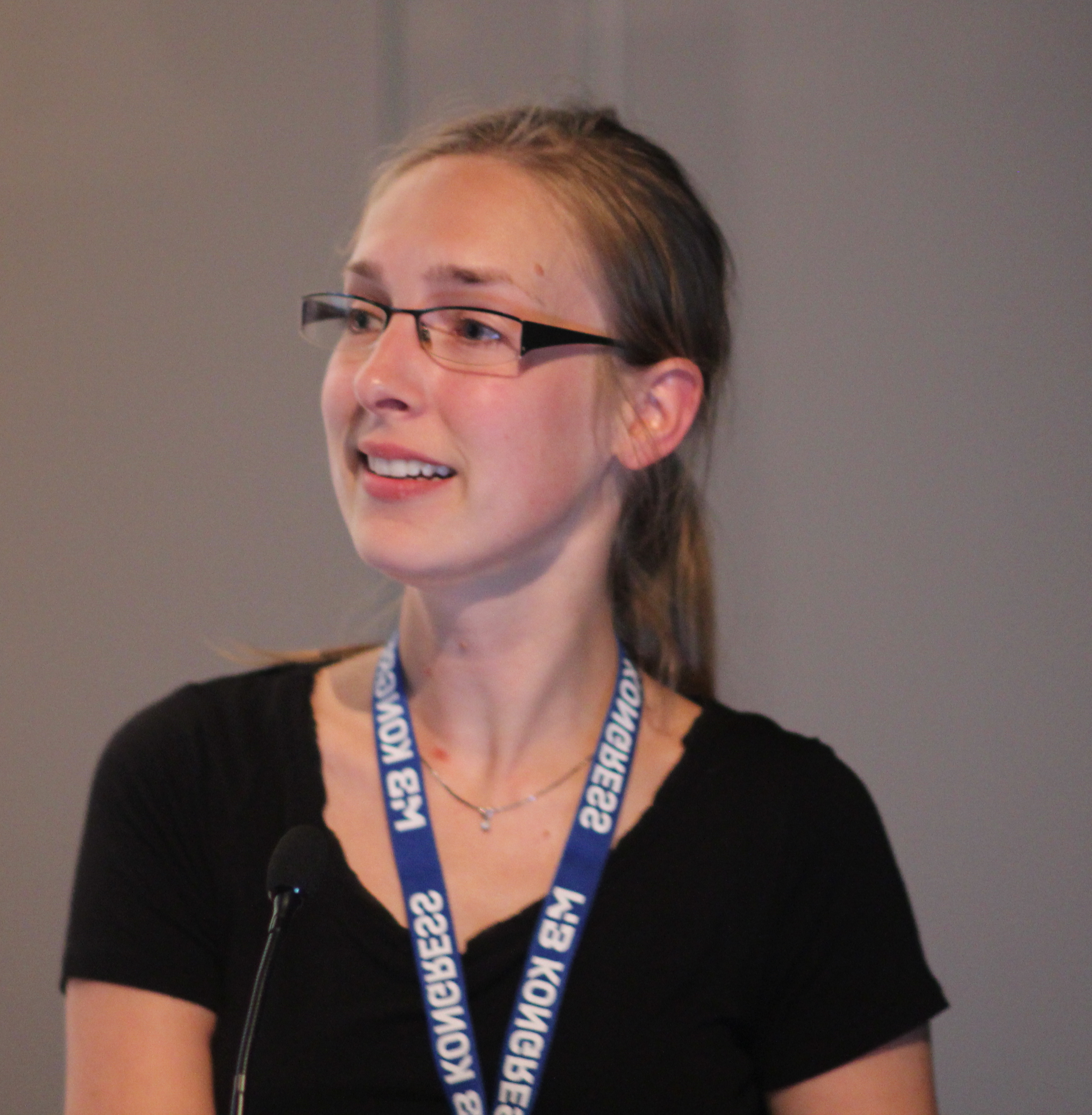 Iselin Nybø